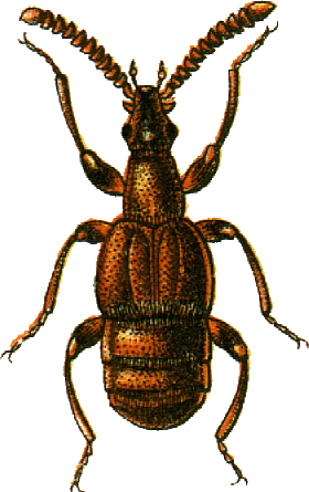 This file has been extracted from another file: Jacobs16.jpg